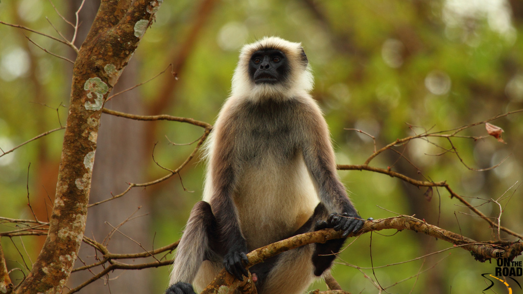 Kabini Nagarhole National Park Karnataka India